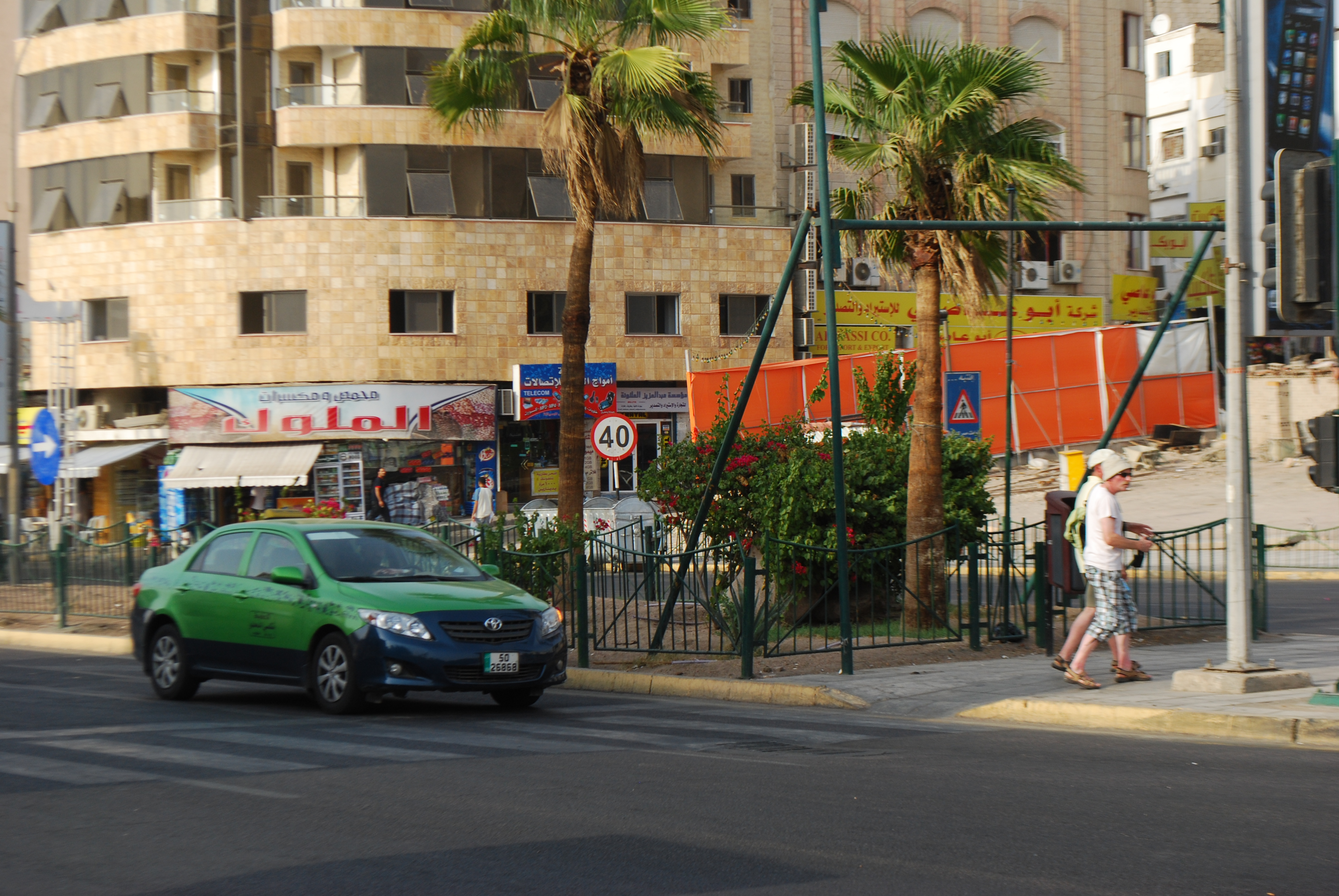 Aqaba : le boulevard côtier.